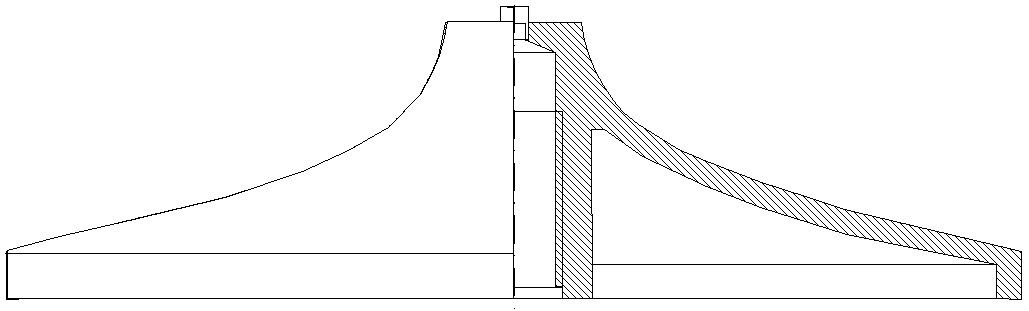 Wzornik do wyoblania Autor: --Pawel S 00:41, 20 kwi 2007 (CEST) Użycie za podaniem autorstwa (Creative Commons CC-BY 2.5) Rysunek wykonany w programie OpenOffice Draw